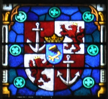 Linz, Neuer Dom, Glasfenster "Maria Attersee" (Böhm-Führer Nr. 30), Detail: Wappen Kottulinsky (nach Dora Gräfin Kottulinsky, der Stifterin des Fensters)